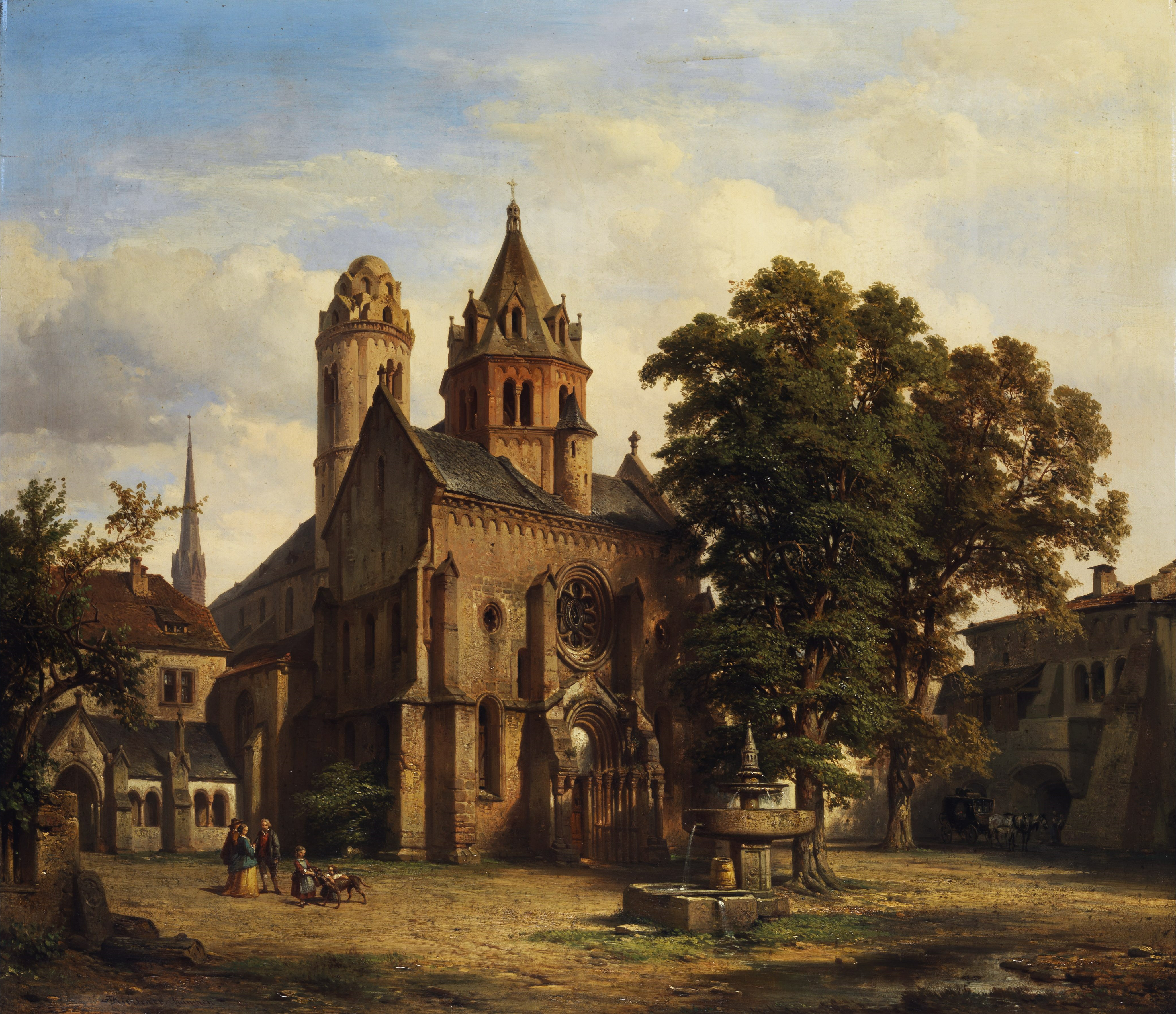 Blick auf eine romanische Kirche. (St. Paulus in Worms) Öl auf Holz. 56 x 76 cm.